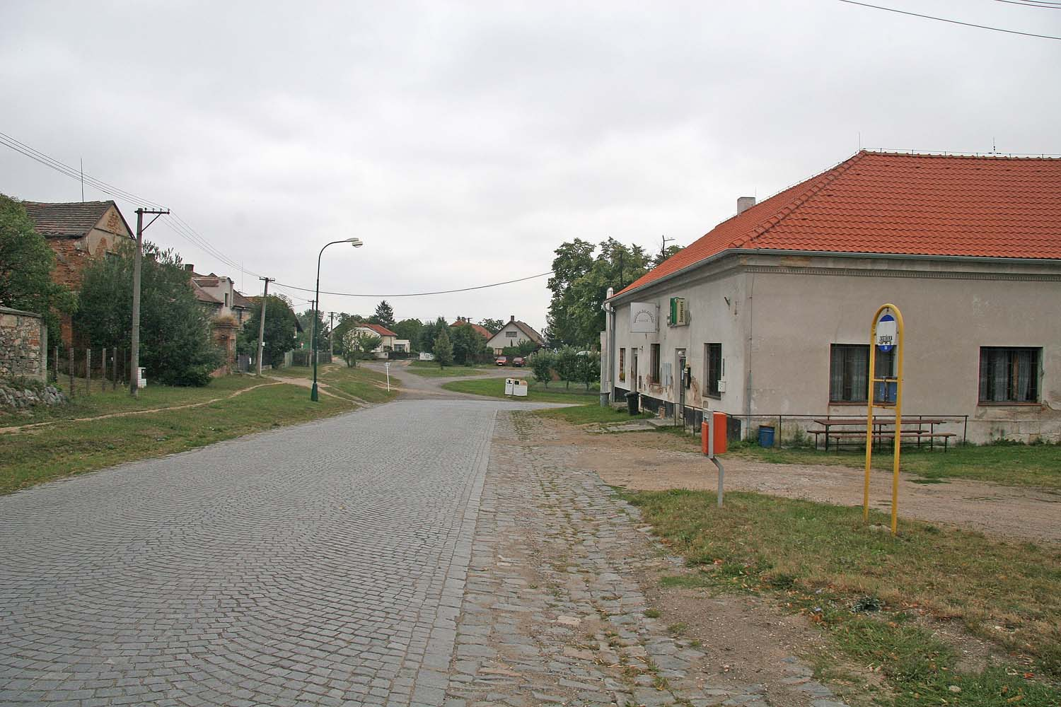 Obec Osice, okres Hradec Králové